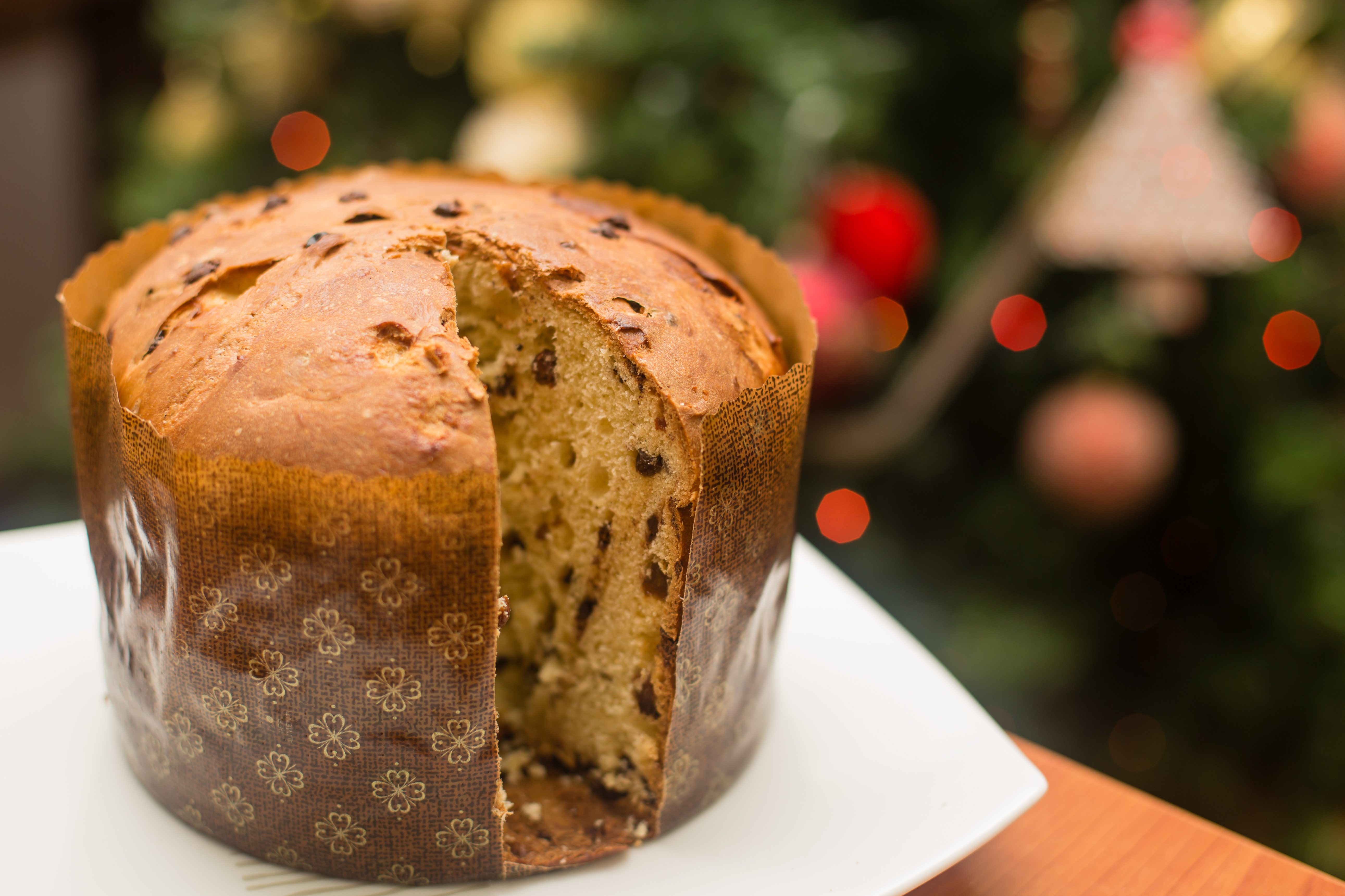 Panettone (pronounced /ˌpænᵻˈtoʊni/;[1][2][3]